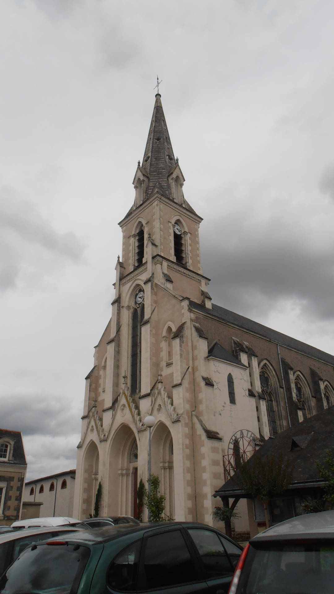 L'église de Saint-Laurent